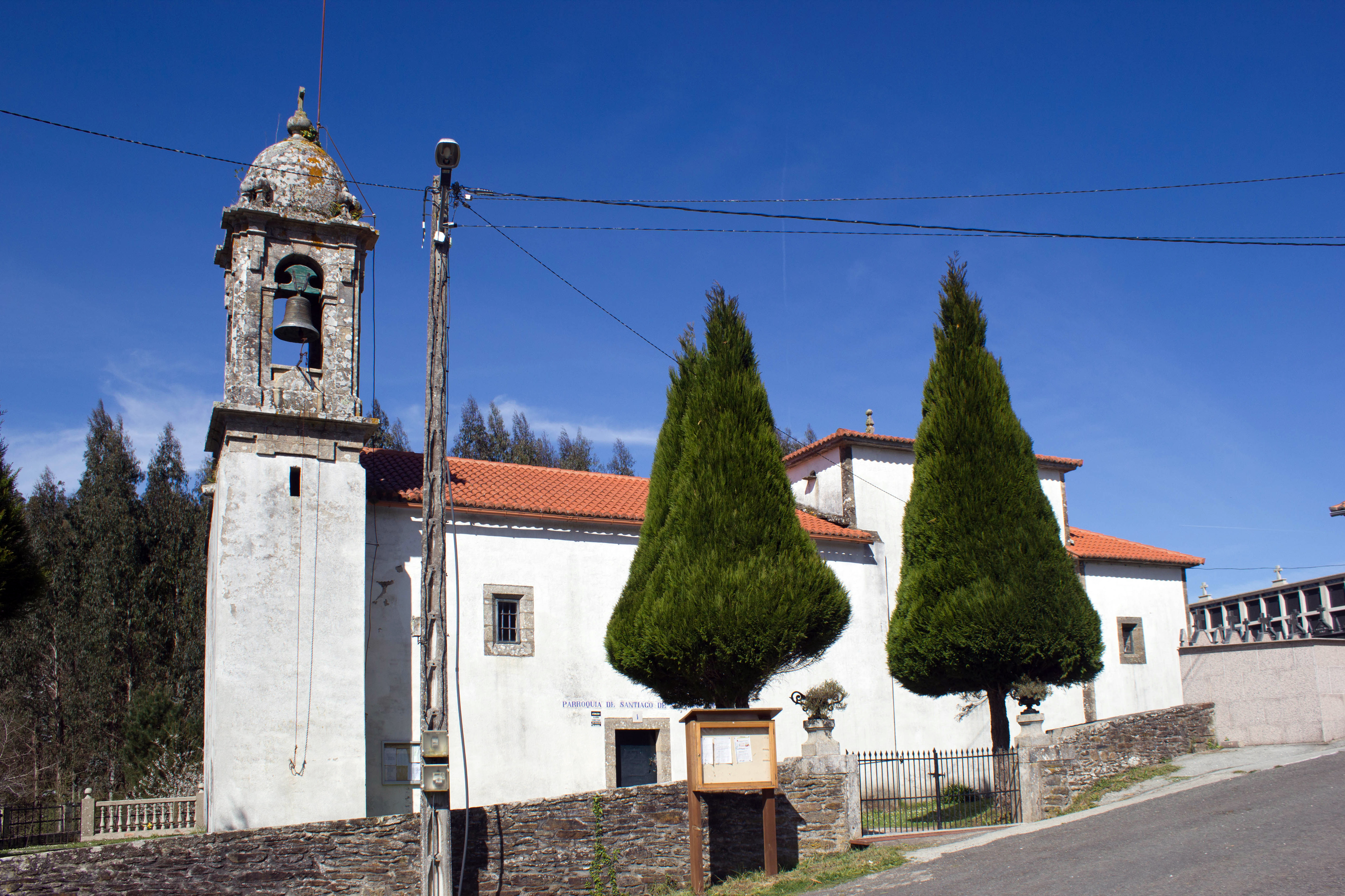 Igrexa de Santiago de Novefontes, no concello de Touro.